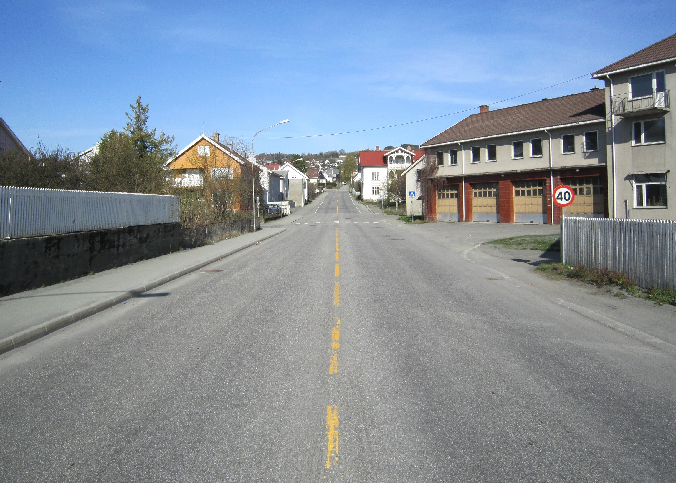 Hunnsvegen (fylkesvei 2388, tidl. 132) på Gjøvik